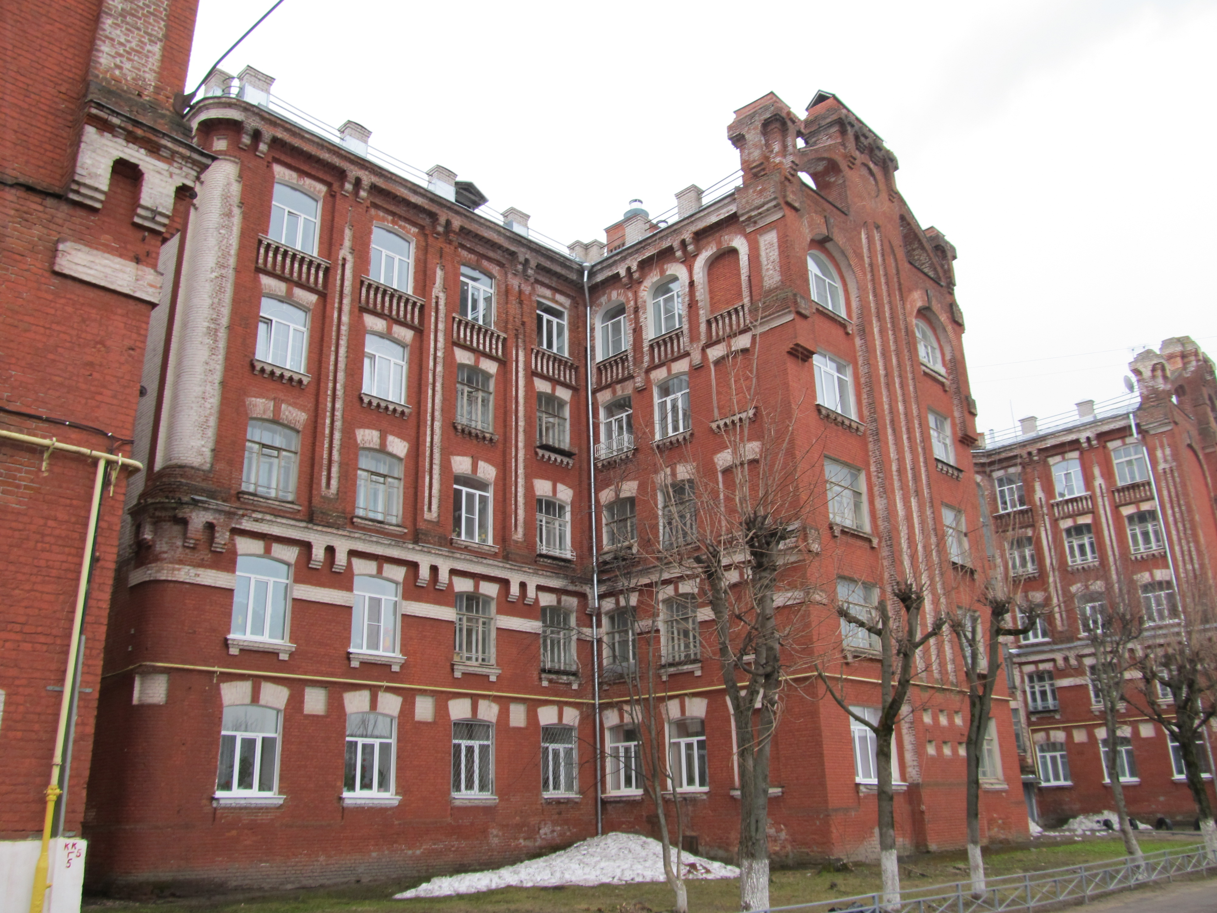 Здание комплекса Морозовский городок. Россия, Тверь, улица Двор Пролетарки, д. 70.